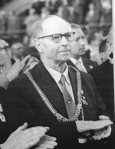 Title: Berlin, V. SED-Parteitag, Thiessen, Volmer, Henselmann, Havemann Extra information: Max Volmer, Peter Adolf Thiessen, Hermann Henselmann, Robert Havemann People in the image: Henselmann, Hermann Prof.: Institutsdirektor der Bauakademie, Chefarchitekt von Berlin, DDR (GND 118549332) * Thiessen, Peter Adolf Prof. Dr.: Kernphysiker, Vorsitzender des Forschungsrates beim Ministerrat, DDR (GND 118895095) * Volmer, Max Prof. Dr.: Chemiker, Vizepräsident der Akademie der Wissenschaften (AdW), Nationalpreis 1955, Vaterländischer Verdienstorden (VVO) in Gold 1957, DDR (GND 101352832) * Havemann, Robert Prof. Dr.: Atomphysiker, Regimekritiker, DDR (GND 118547240) Factual corrections and alternative descriptions are encouraged separately from the original description. Additionally errors can be reported at this page to inform the Bundesarchiv. Original historic description: Zentralbild Heilig 13.7.1958 V. Parteitag der SED vom 10. bis 16.7.1958 in der Werner-Seelenbinder-Halle, Berlin 5. Tag. UBz: Zu einem begeisterten Höhepunkt gestaltete sich die Begrüßung des Parteitages durch eine Delegation hervorragender Wissenschaftler, Angehöriger des sozialistischen wissenschaftlichen Nachwuchses. UBz: Die Wissenschaftler hatten ihre Plätze vor den ersten Sitzreihen eingenommen. Vorn links: Leninpreisträger [gestrichen: und Nationalpreisträger] Prof. Dr. Thiessen, Vorsitzender des Forschungsrates der DDR, (rechts) der hervorragende Wissenschaftler des Volkes und Nationalpreisträger Prof. Dr. Volmer, Präsident der Deutschen Akademie der Wissenschaften, (2. Reihe von links nach rechts) Nationalpreisträger Prof. Henselmann und Prof. Havemann.